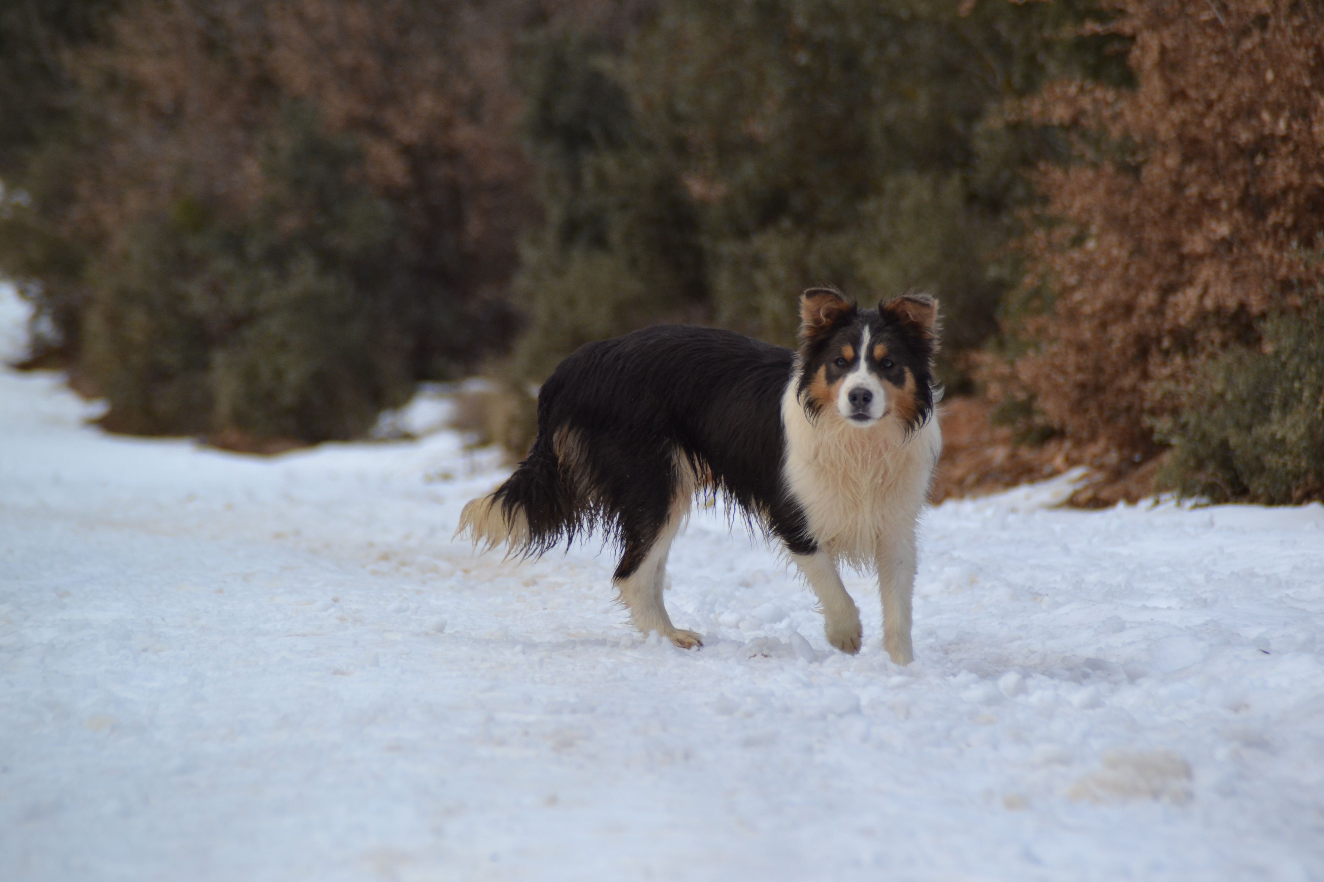 Border Collie Hembra Azul tricolor y buen porte